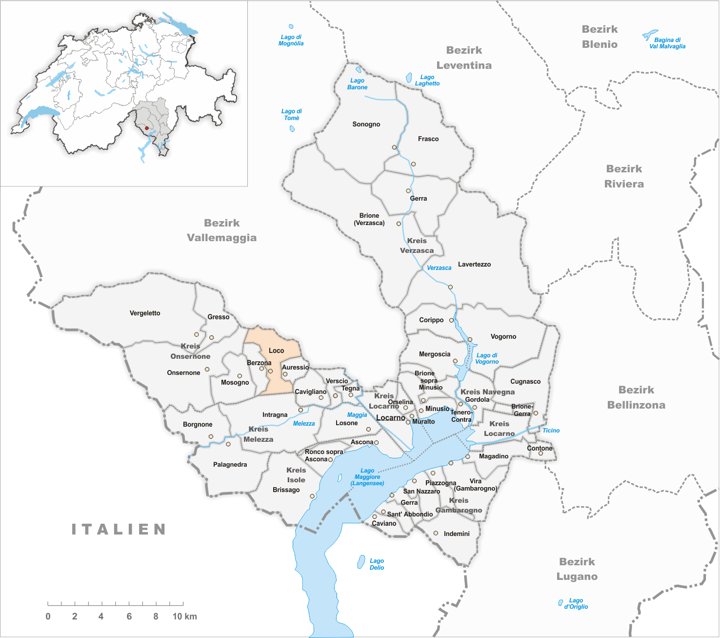 Municipality Loco